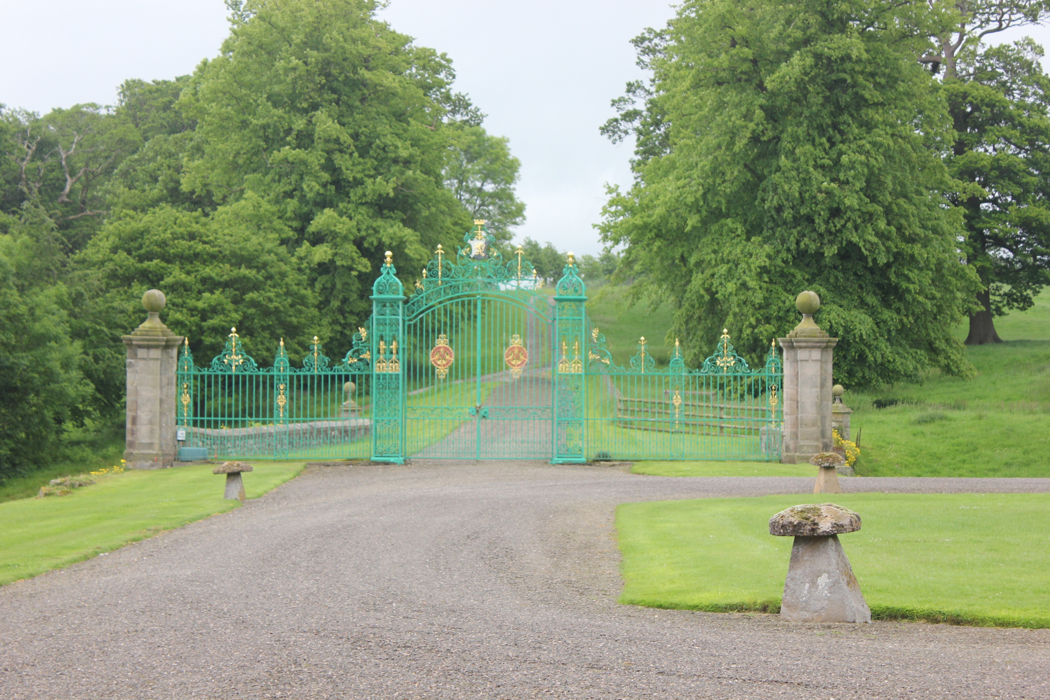 Mostyn Hall